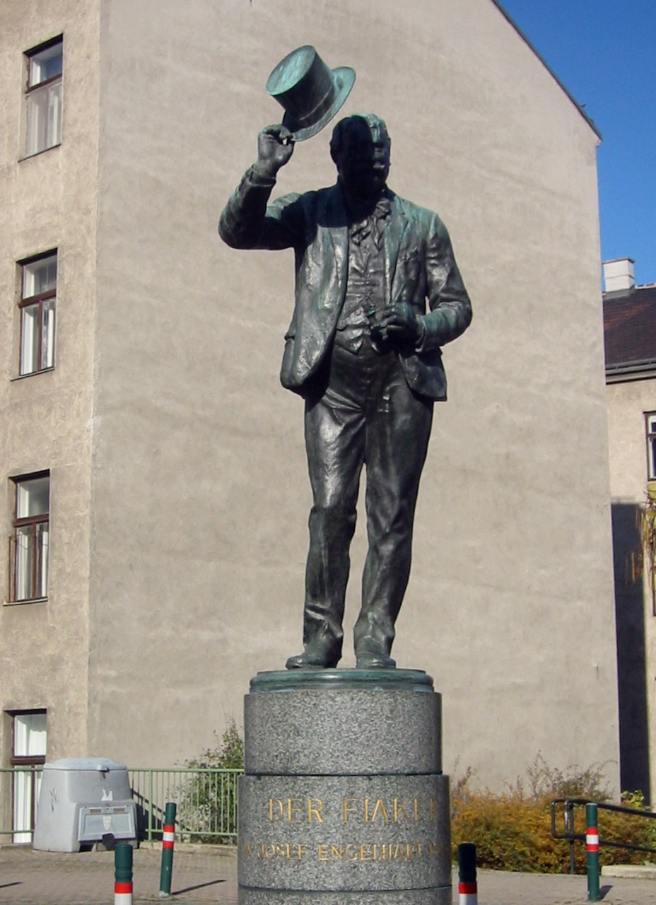 Wien, Denkmal am Fiakerplatz